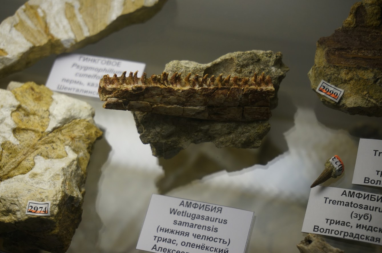 Часть нижней челюсти лабиринтодонта Wetlugasaurus samarensis. Музей института экологии Волжского бассейна РАН